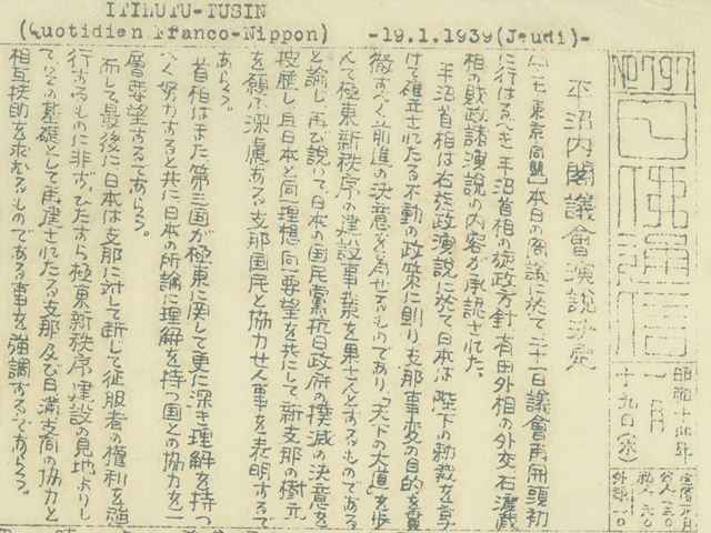 1939年1月19日分の日仏通信の一部の写真データ（私所蔵部分）